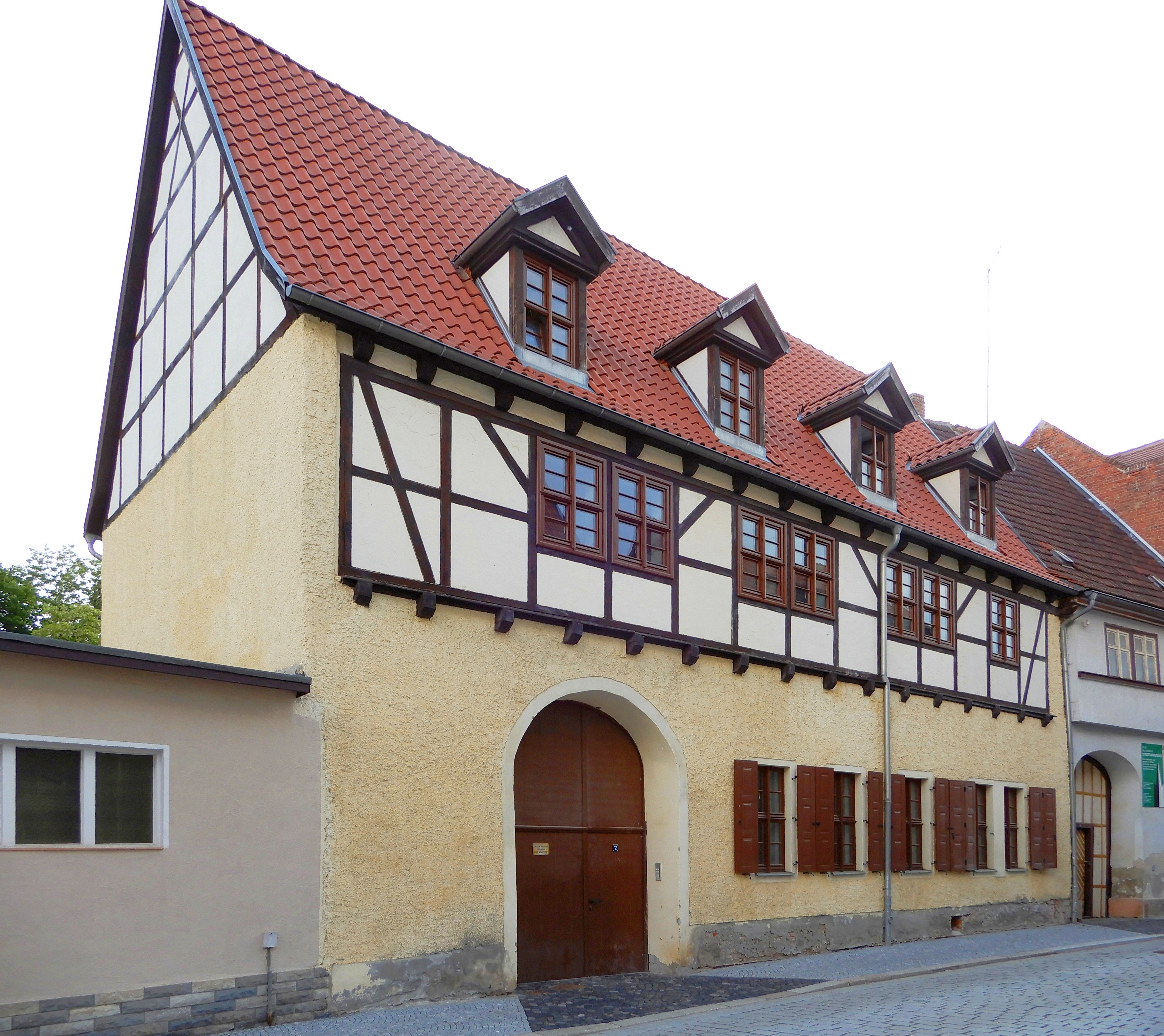 Gebäude Über dem Wasser 7 in Aschersleben